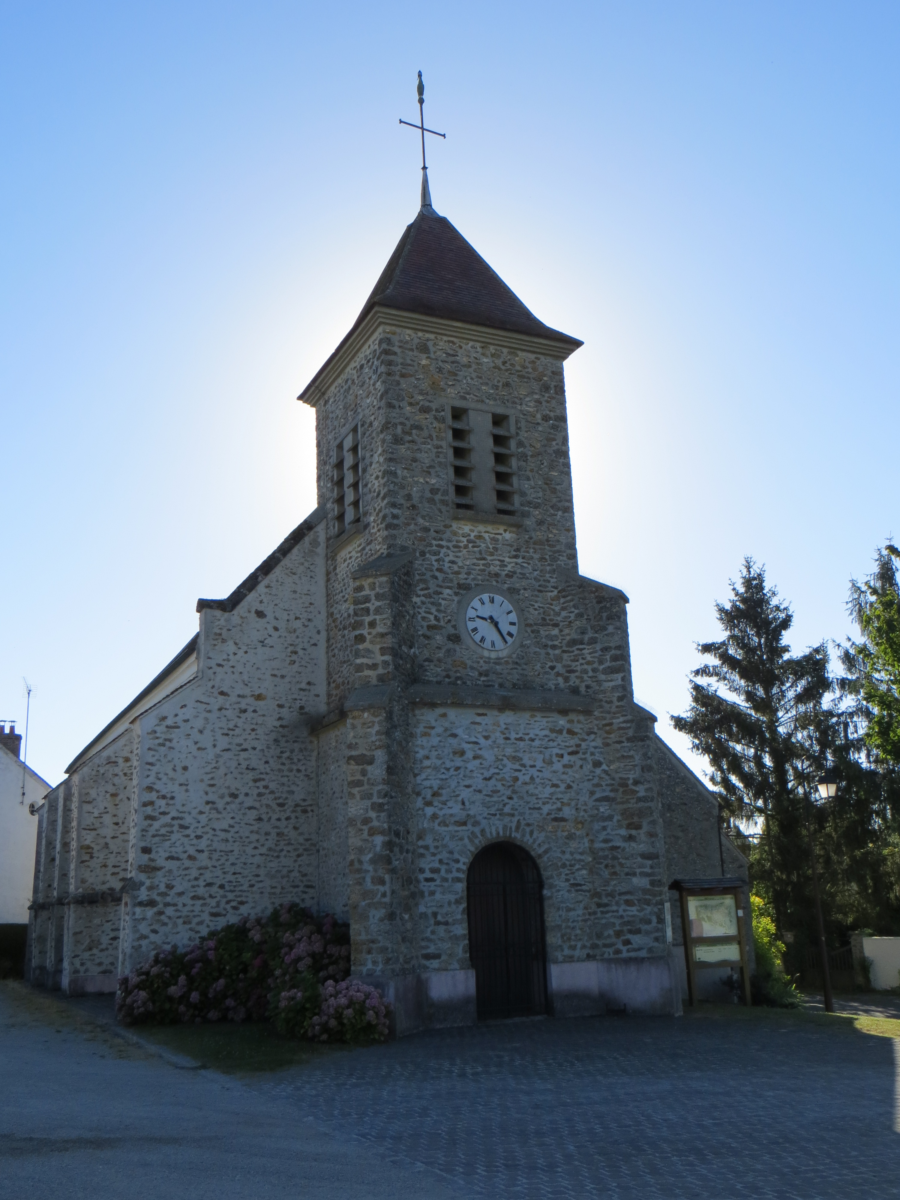 Vue générale de l'église